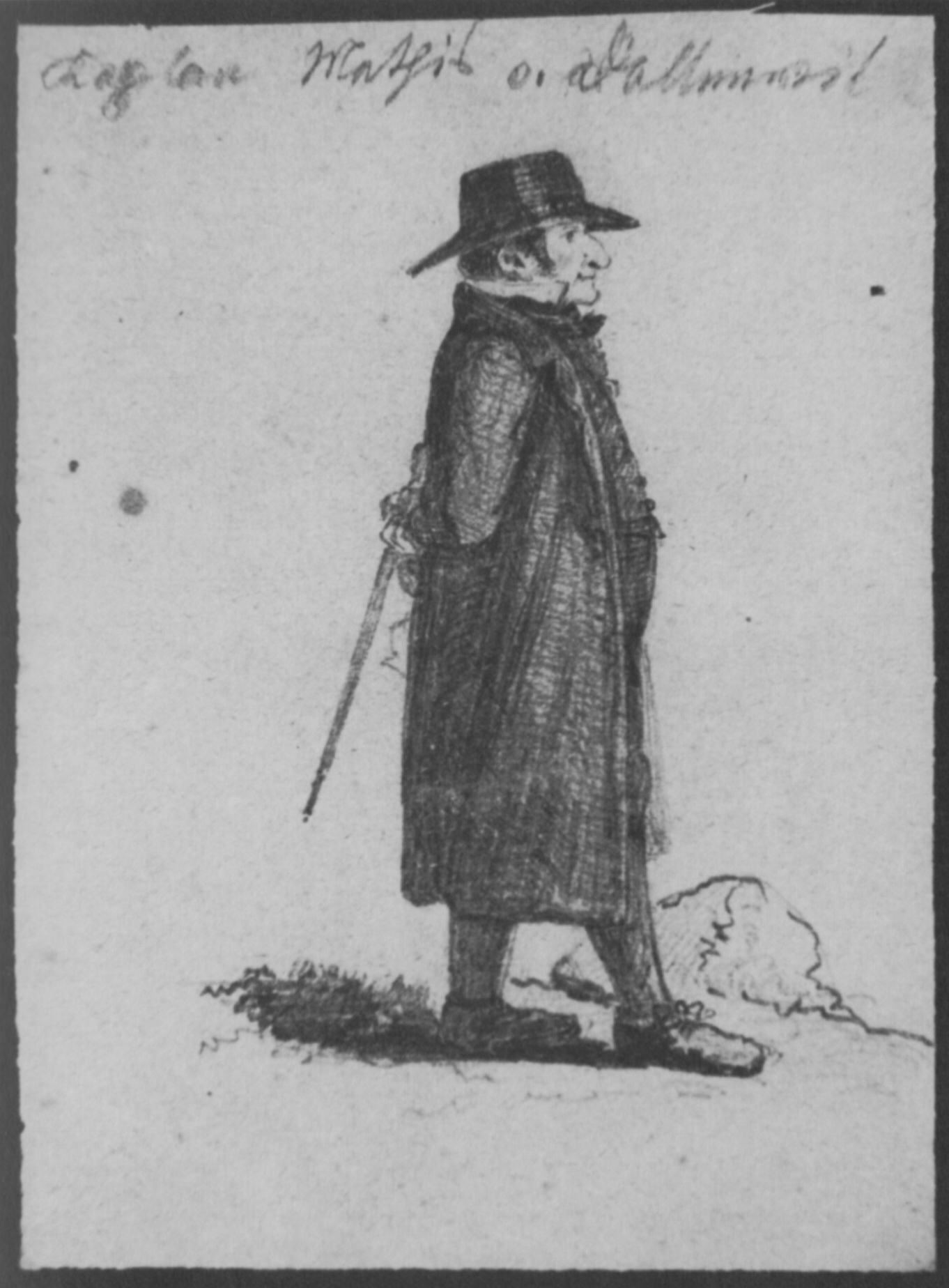 Jakob Joseph Matthys (1802–1866) als Kaplan in Dallenwil, Nidwalden. Zeitgenössische Bleistiftzeichnung von unbekannter Hand.